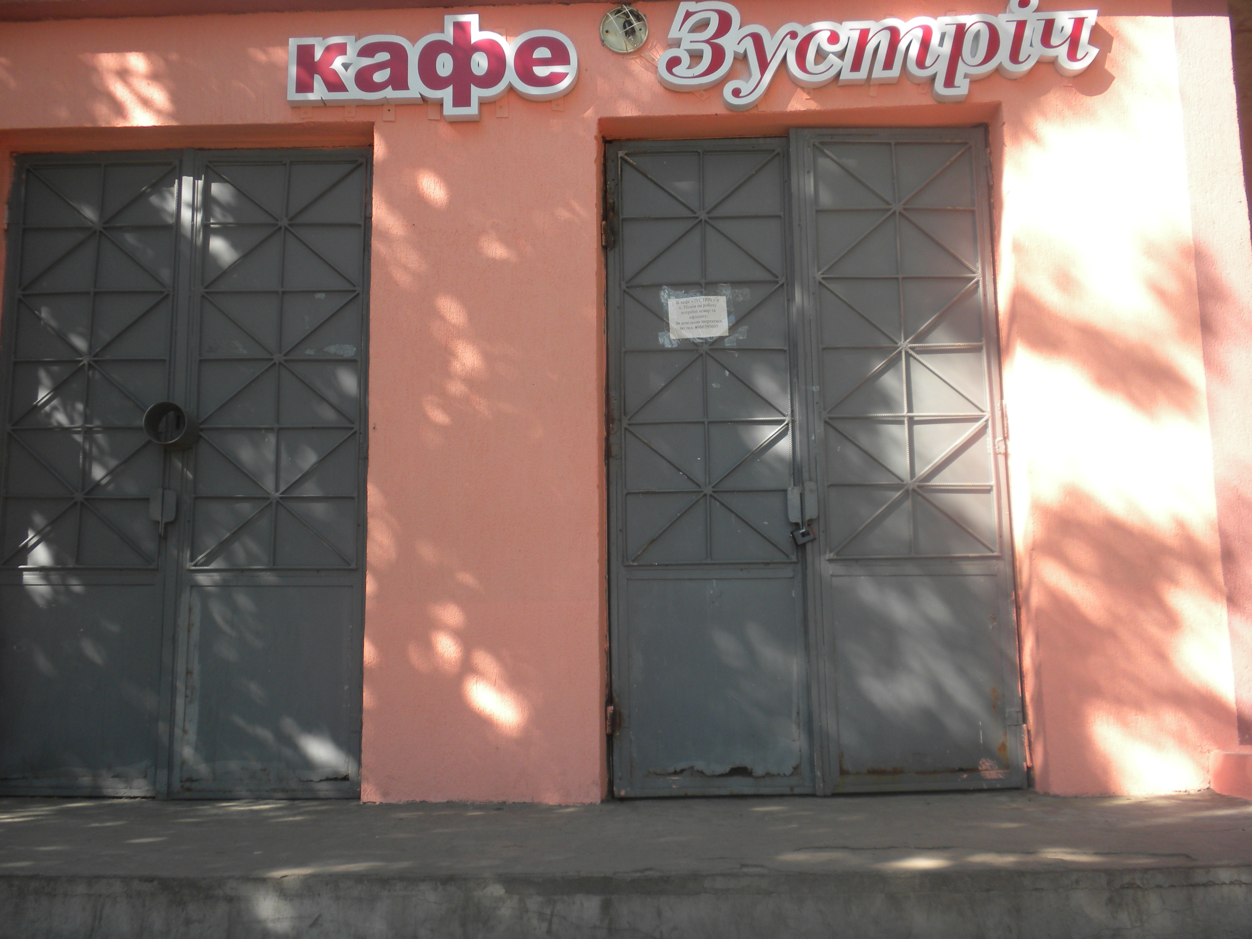 Кафе "Зустріч"